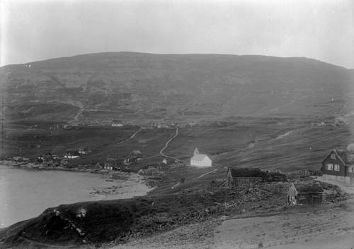 Føroyskt: Vestmanna - útsýni av Heygum Faroe Islands